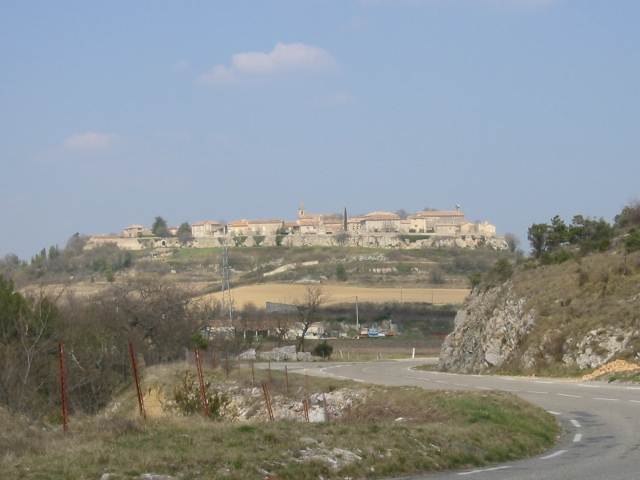 Village provencale de Lussan dans le Gard (France)